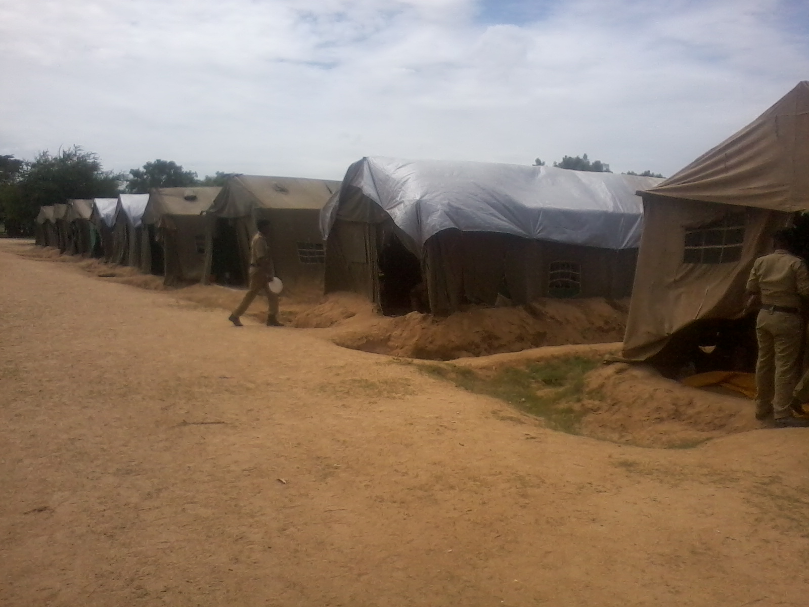 தேசிய மாணவர் படை முகாம் - கூடாரம்